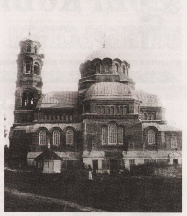 Утраченный Смоленский храм Старо-Костычевского монастыря